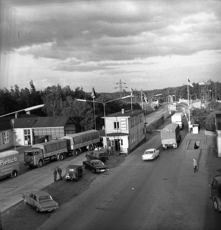 Grenzkontrollpunkt Helmstedt Zentralbild/Link 10.6.1967 Westdeutscher Grenzkontrollpunkt Helmstedt.